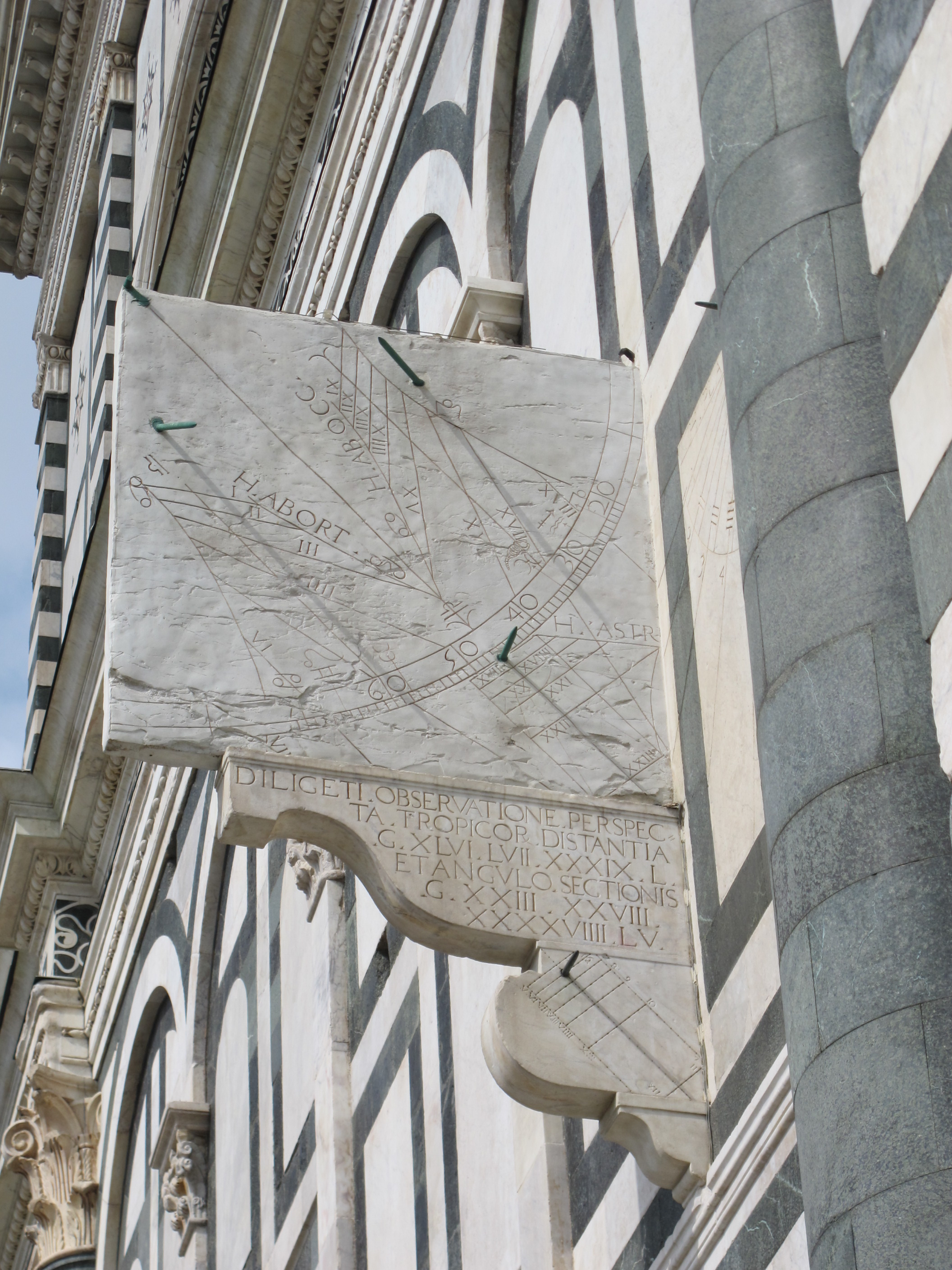 Smn, facciata, meridiana dx